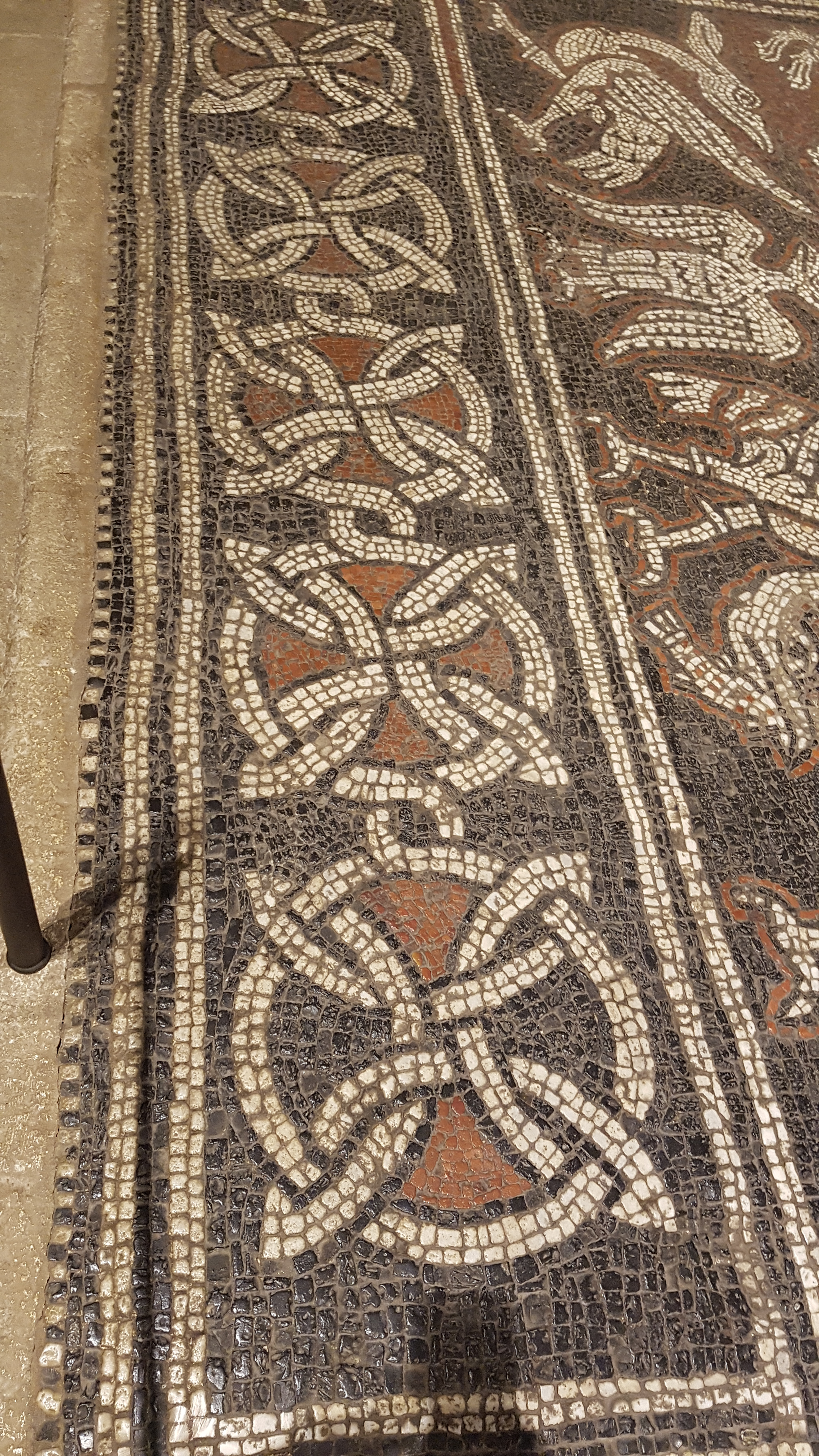 Motifs décoratifs de la mosaïque de l'abbaye de Ganagobie, situés en marge des représentations figuratives